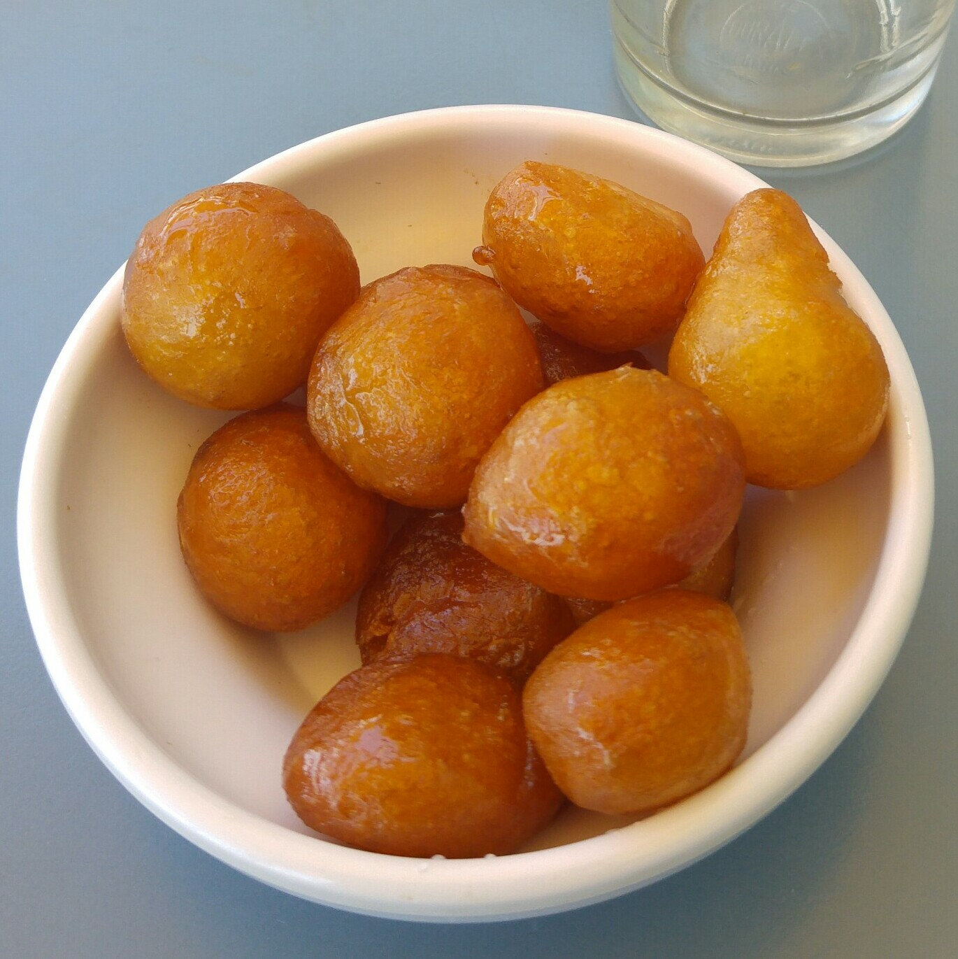 עוואמה